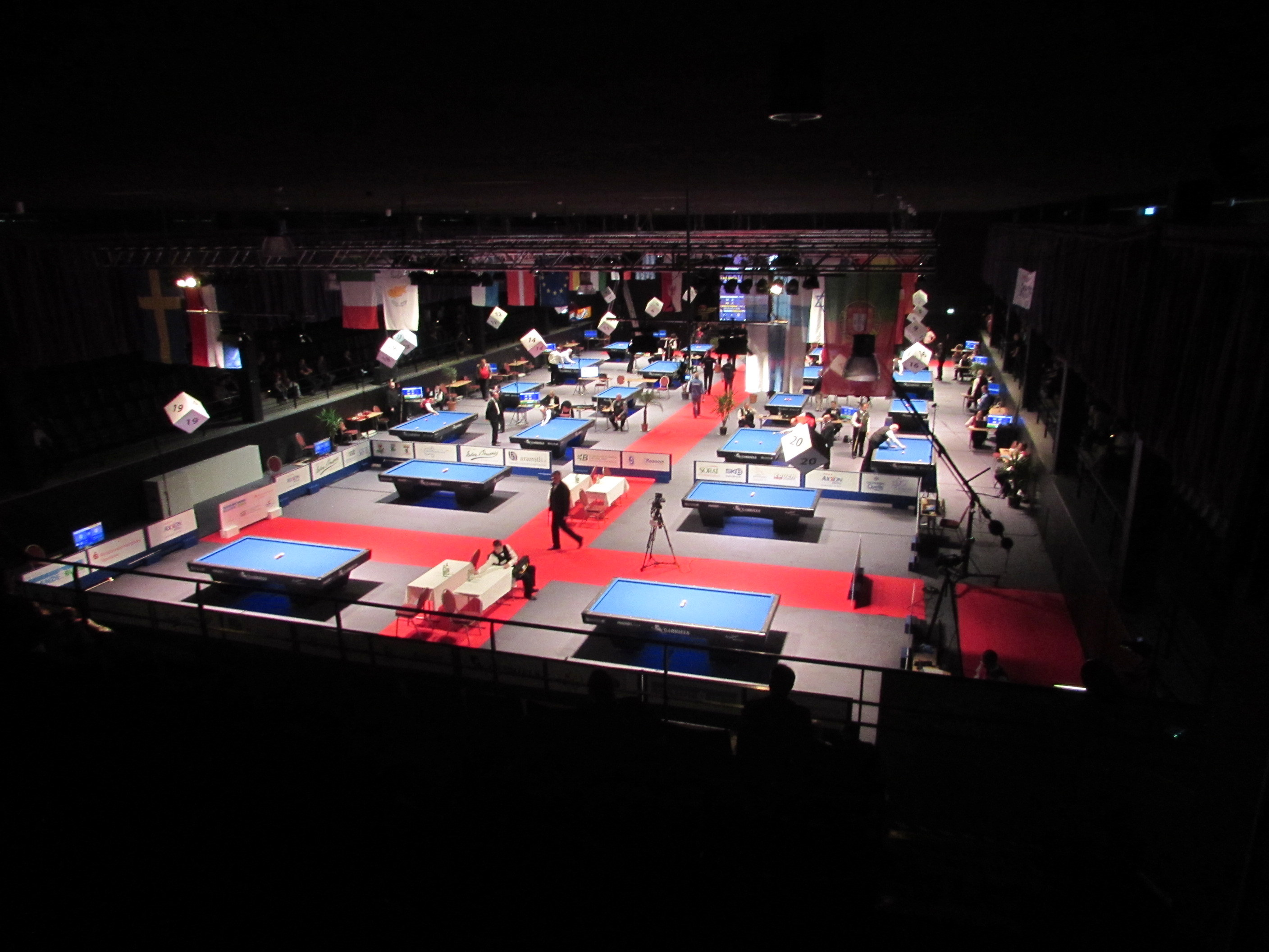 billard, carambolage-em 2015, stahlpalast, brandenburg an der havel